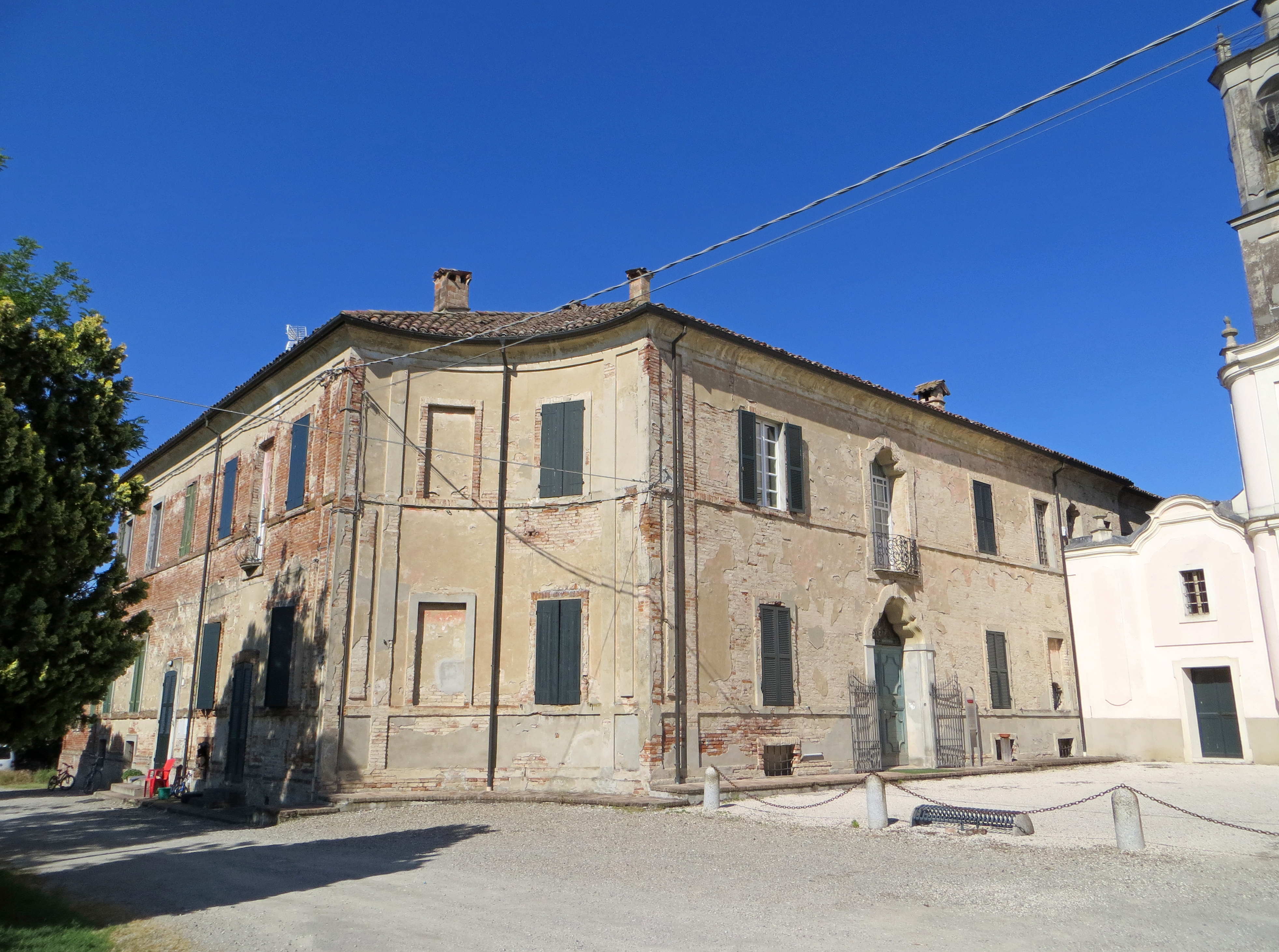 Chiesa di San Benedetto (Priorato, Fontanellato) - canonica